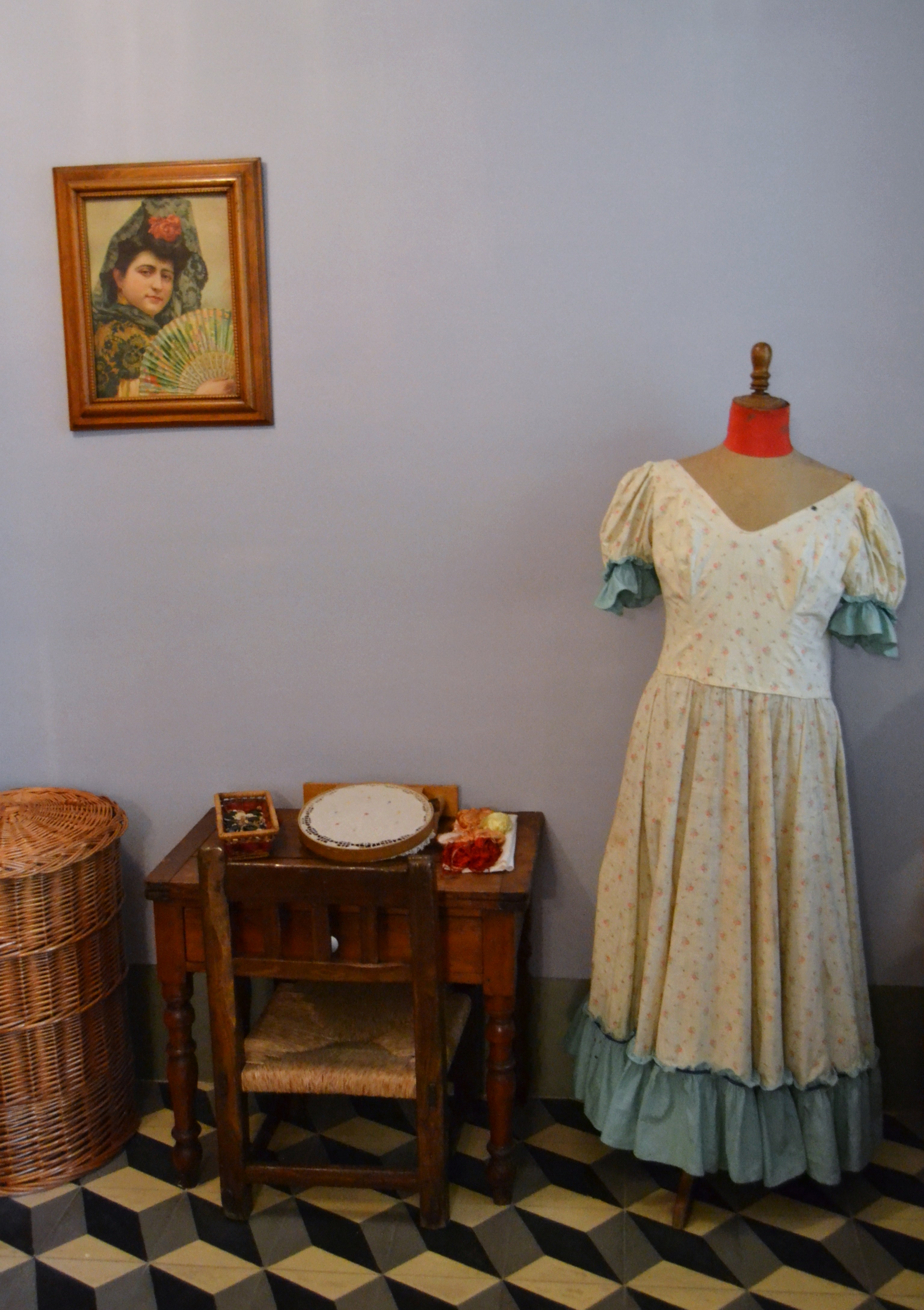 Casa-Museu Concha Piquer de València, taller de costura.